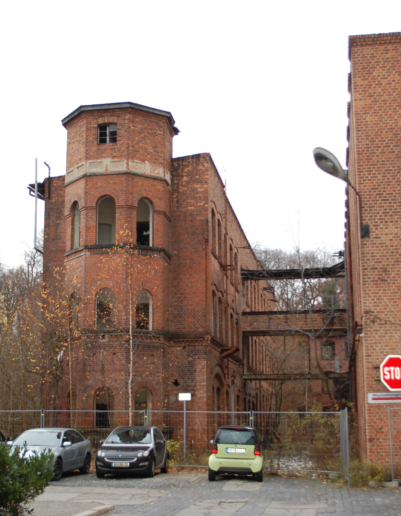 Frabrikgebäude Klopstockweg 10 in Quedlinburg